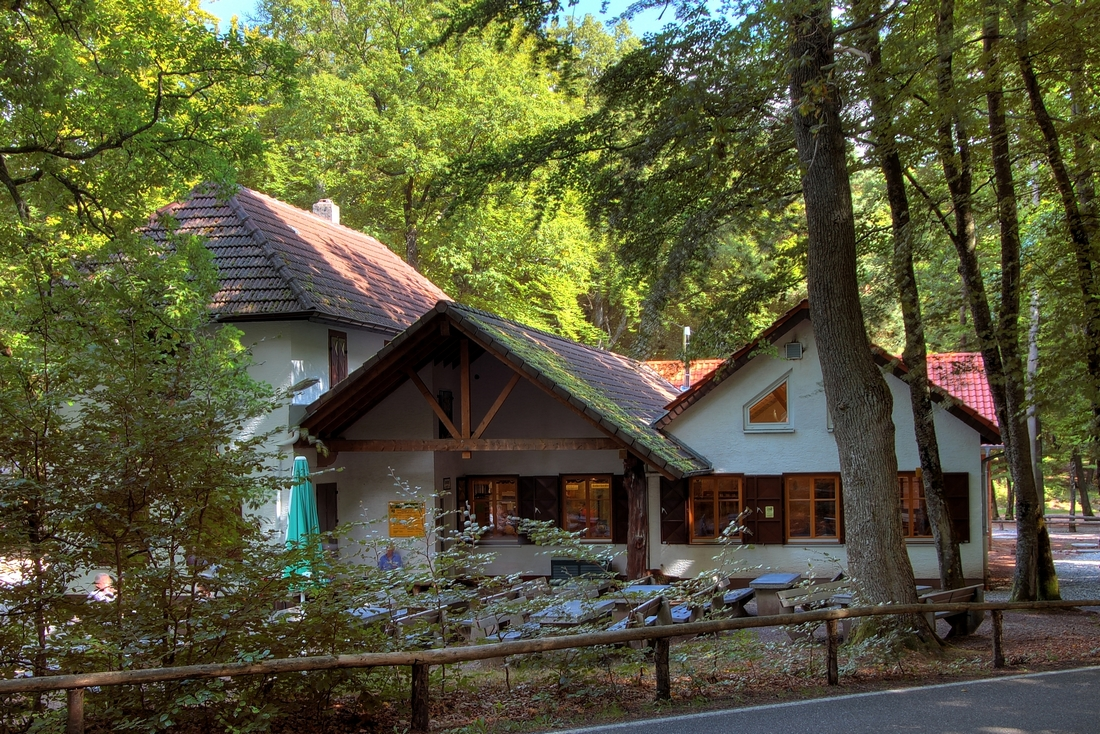 Die Totenkopfhütte an der Totenkopfstraße im Pfälzerwald.